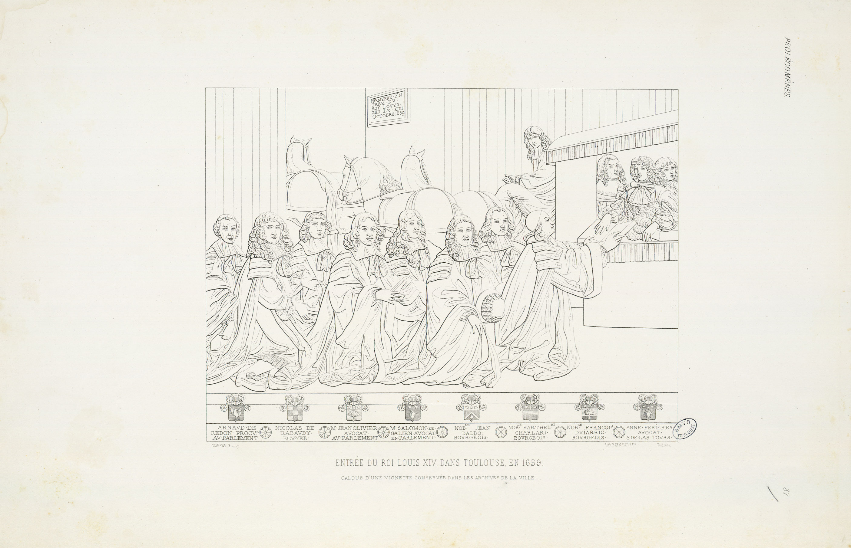 Texte incomplet des dernières pages. La plupart des lithographies ont été tirées par les ateliers de Raynaud frères, d'après A. Du Mège. Quelques unes ont été dessinées et lithographiées par Charles Gall, Bonnet, E. Binet, Durand, M. Pomier, P. Lacour, G. Chariol, Les planches sont numérotées mais plusieurs manquent sur les 49 annoncées (pl. 1, 6, 13, 18, 21,22, 23, 24, 25, 26, 27, 28, 30, 31, 32, 33, 38, 40, ...) : il semblent que ces planches n'aient jamais été publiées (voir note p. 9 du texte). - Les 4 dernières planches sont extraites du tome II de l'Atlas de l'Archéologie Pyrénéenne. Monuments mythologiques (pl. 1 à 6). Pièces jointes : couvertures papier de différentes livraisons Ancely, René (1876 - 1966). Possesseur